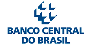 logotipo do Banco Central do Brasil